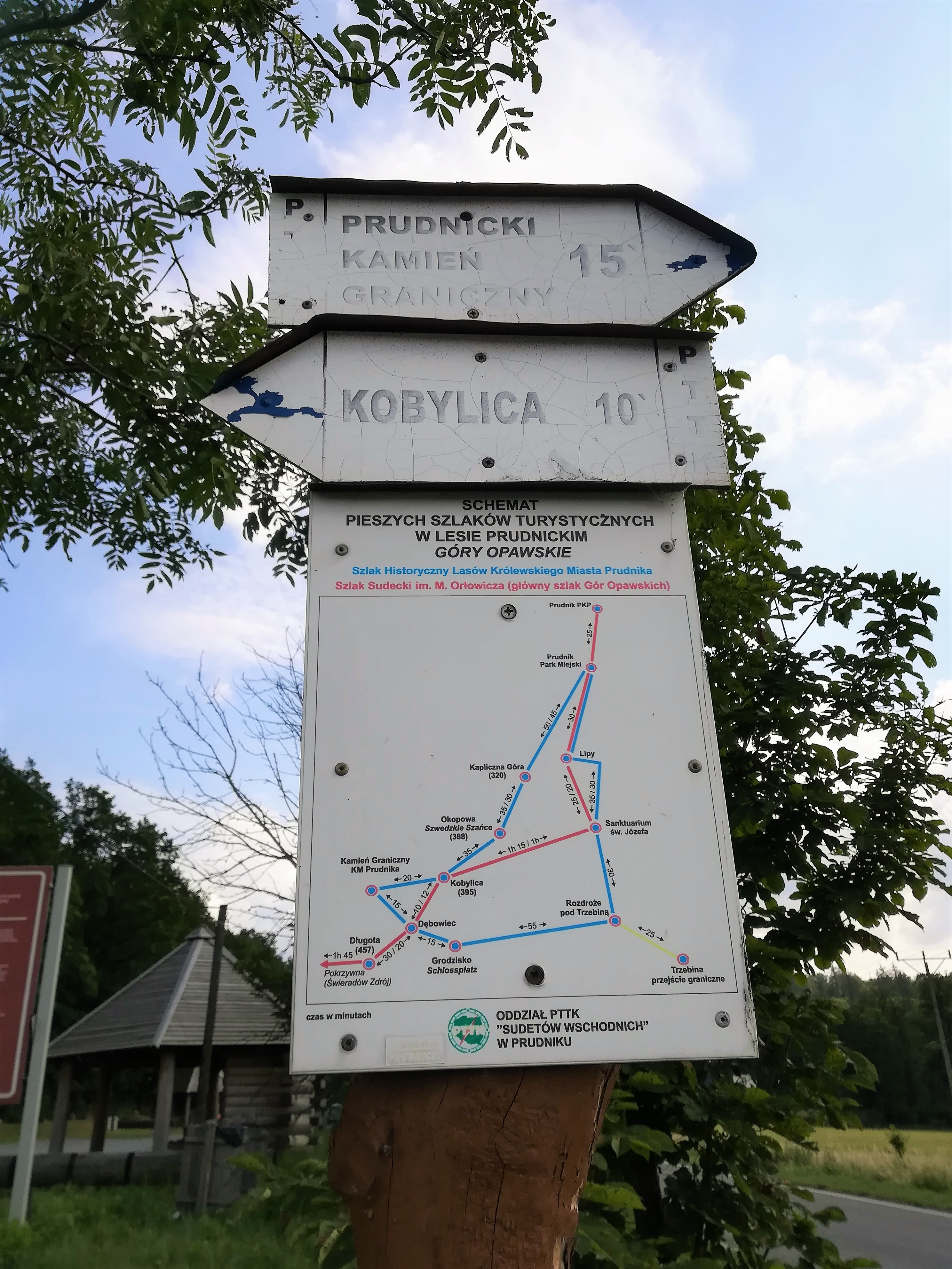 Szlaki w Dębowcu - Góry Opawskie.